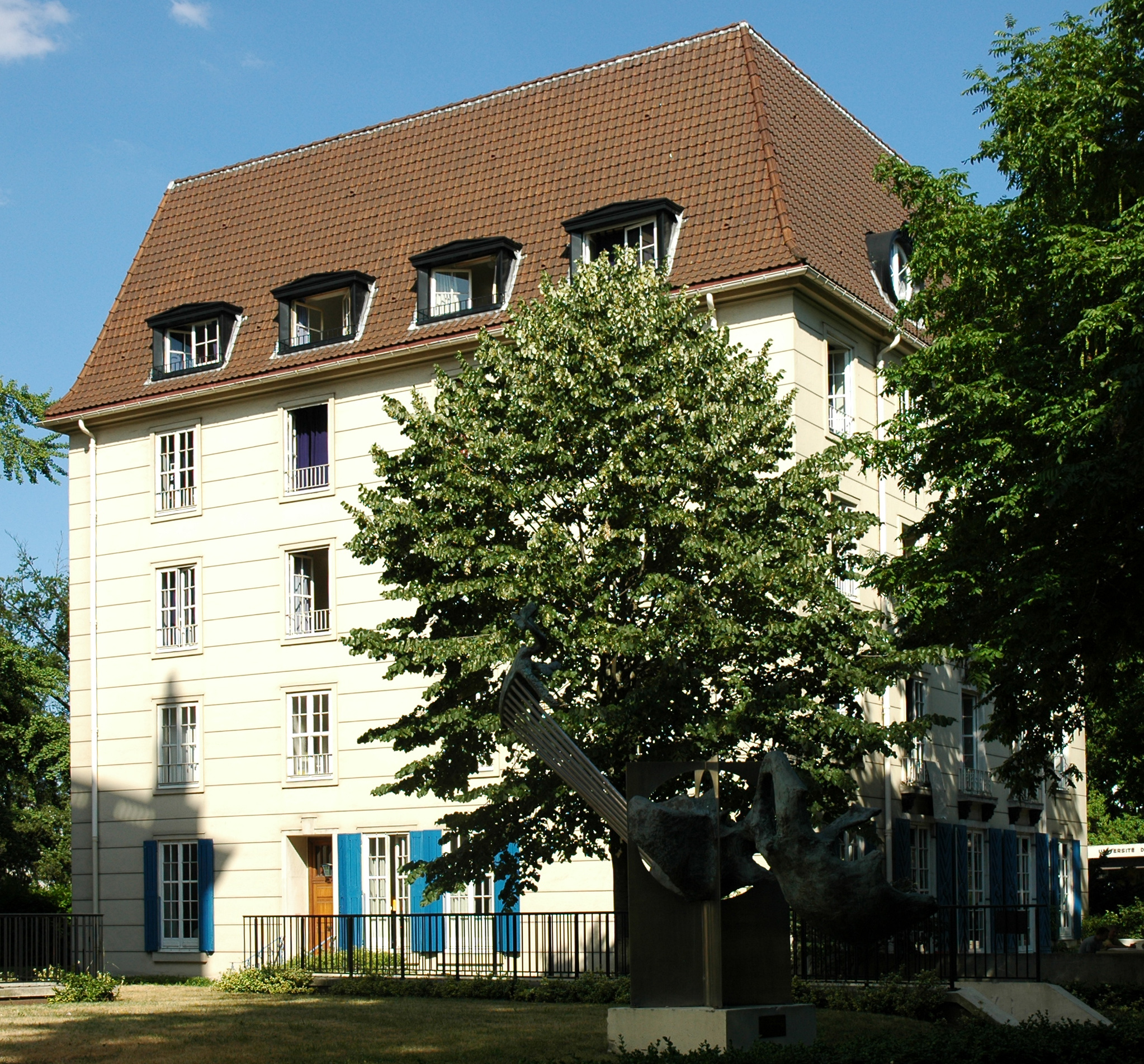 France Paris Cité Universitaire Maison de la Suède Photographie prise par GIRAUD Patrick